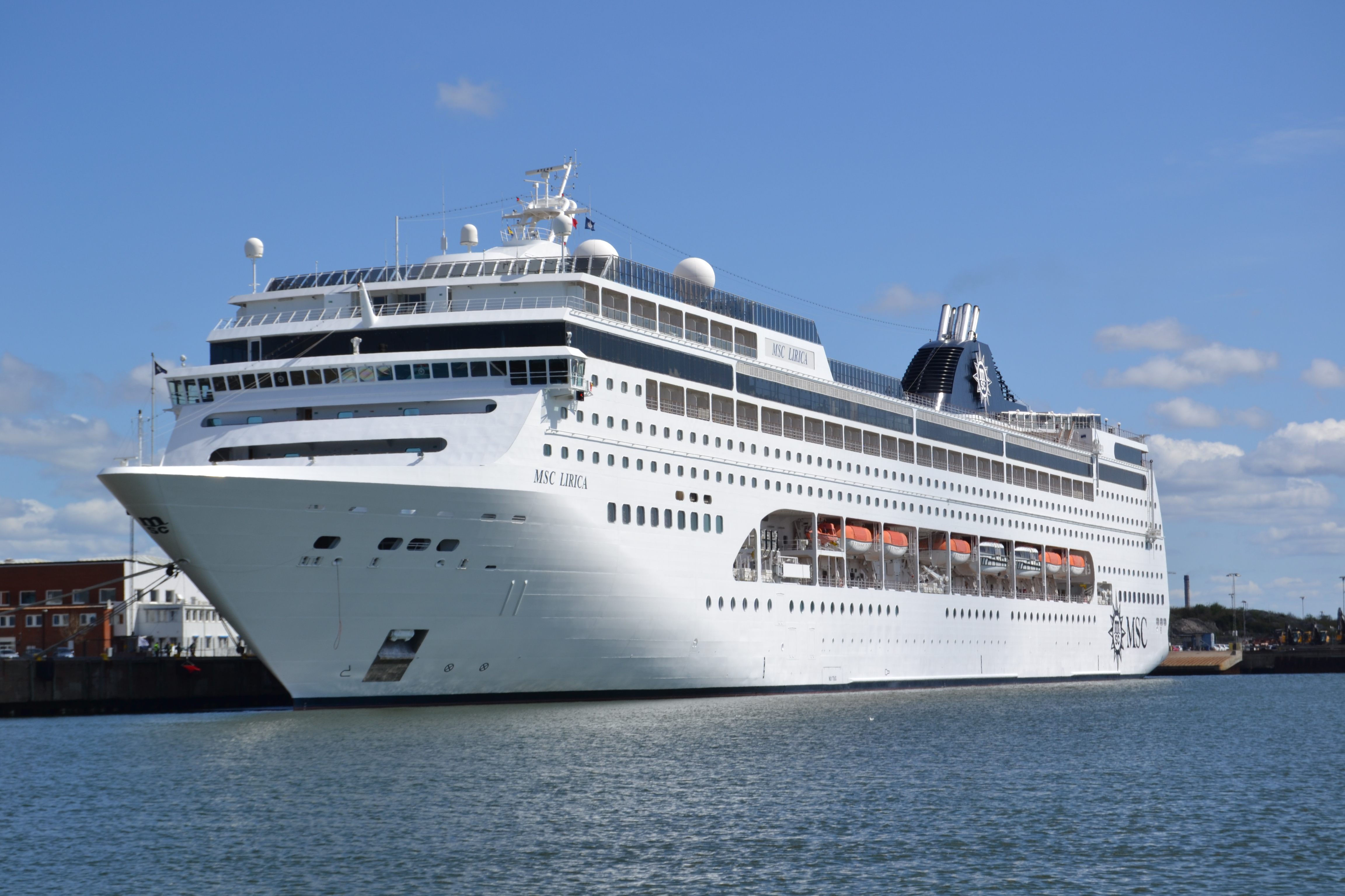 MSC Lirica Ligger vid Arendalskajen